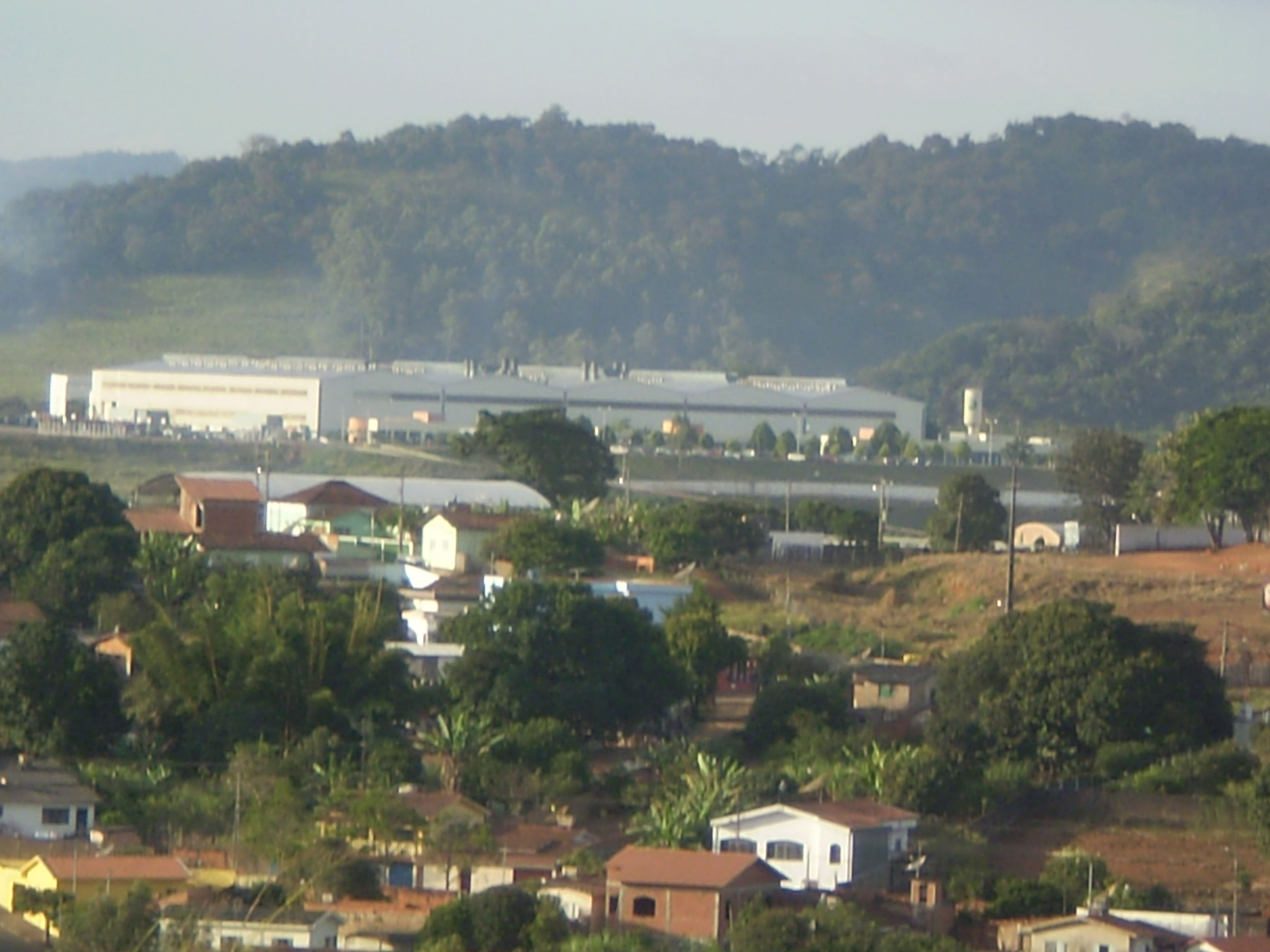 paisagem tipica